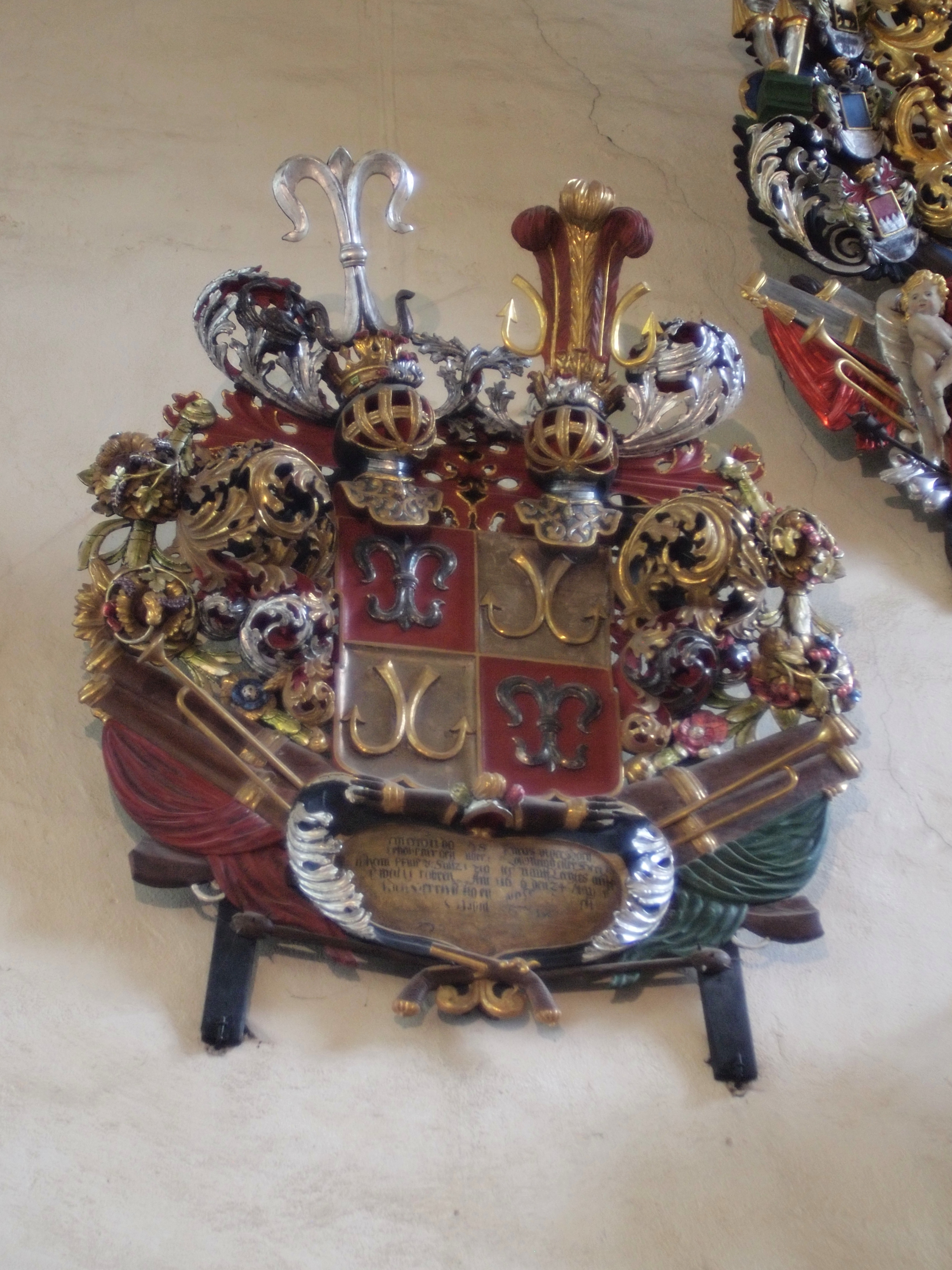 Eestimaa aadliku Anton Philipp von Saltza vappepitaaf Niguliste kirikus